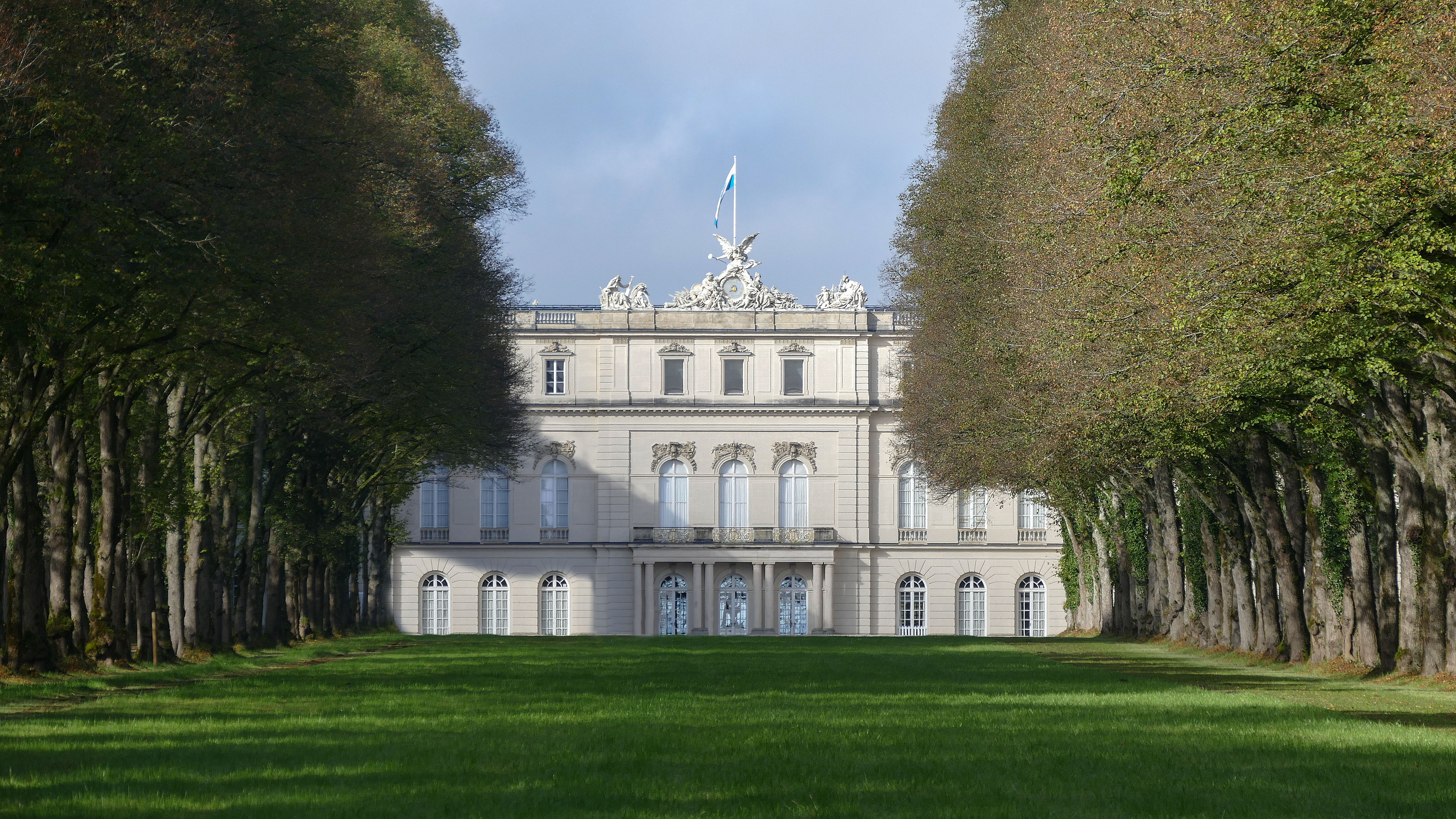 Die unbekannte Rückseite des Schlosses Herrenchiemsee